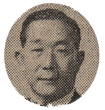 김신은 대한민국의 군인이자 대한민국의 독립운동가, 군인, 정치인이며 공군중장, 제21대 교통부 장관, 유신정우회 소속 제9대 국회의원, 중화민국 대사 등을 역임하였다.